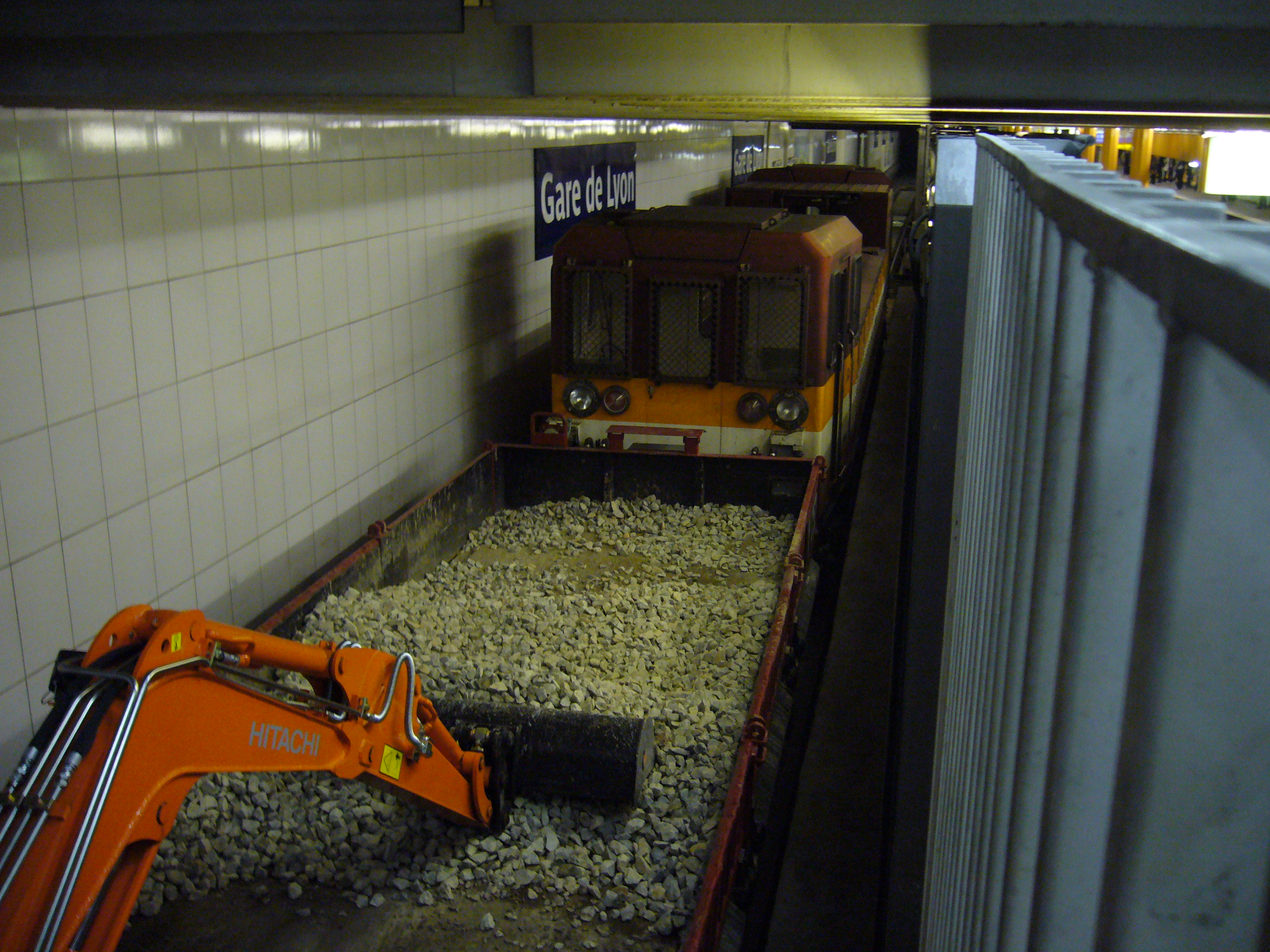 Un train de travaux du métro de Paris (tracteur à marche autonome ou TMA tractant un chargement de ballast) stationné sur la voie de garage de la station Gare de Lyon sur la ligne 1.